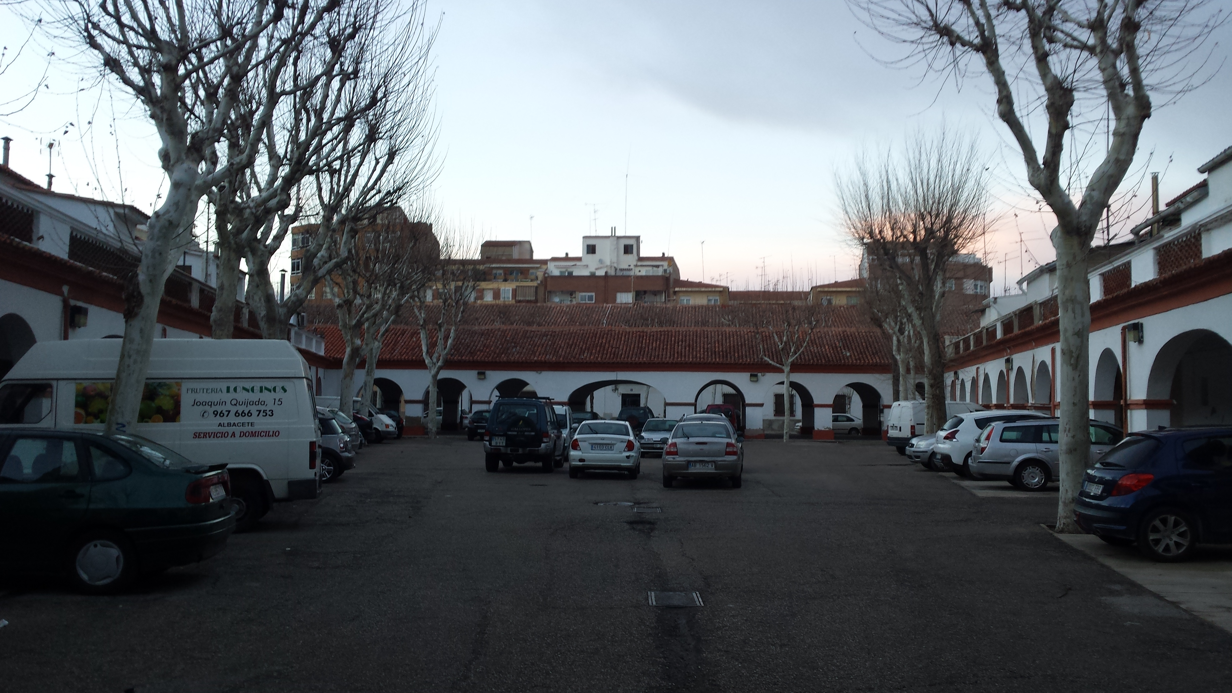 Mercado de las Casas Baratas. Plaza Porticada. Arquitectura de época franquista. Albacete